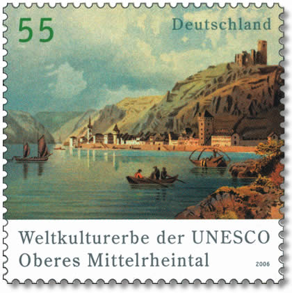 Deutsche Sonderbriefmarke "Weltkulturerbe der UNESCO »Oberes Mittelrheintal«" nach einem Entwurf von Prof. Dieter Ziegenfeuter, Dortmund. Mehr Informationen